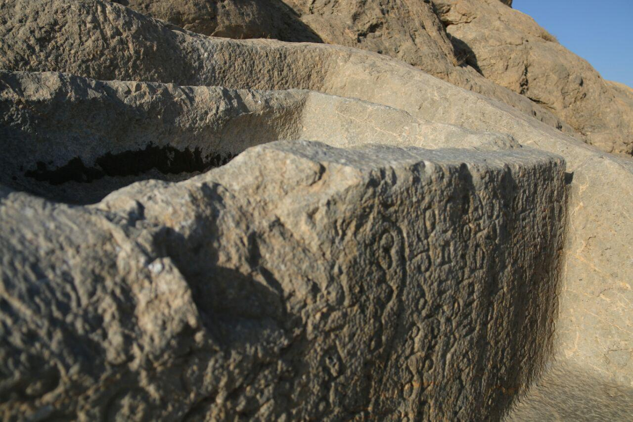 استودان/ کتیبه سنگی/ وحوض دختر گبر